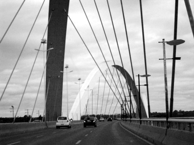 Juscelino Kubitschek Bridge (Ponte Juscelino Kubitschek)